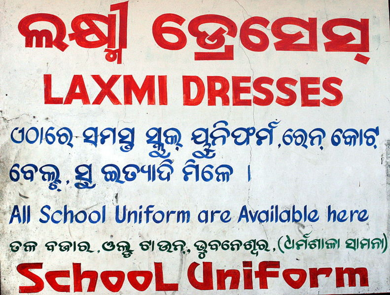 שלט באורייה. צולם ע"י ניר נוסבאום